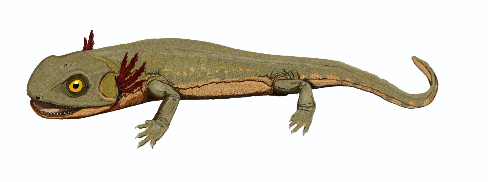 Discosauriscus, autor - Bogdanov,2006